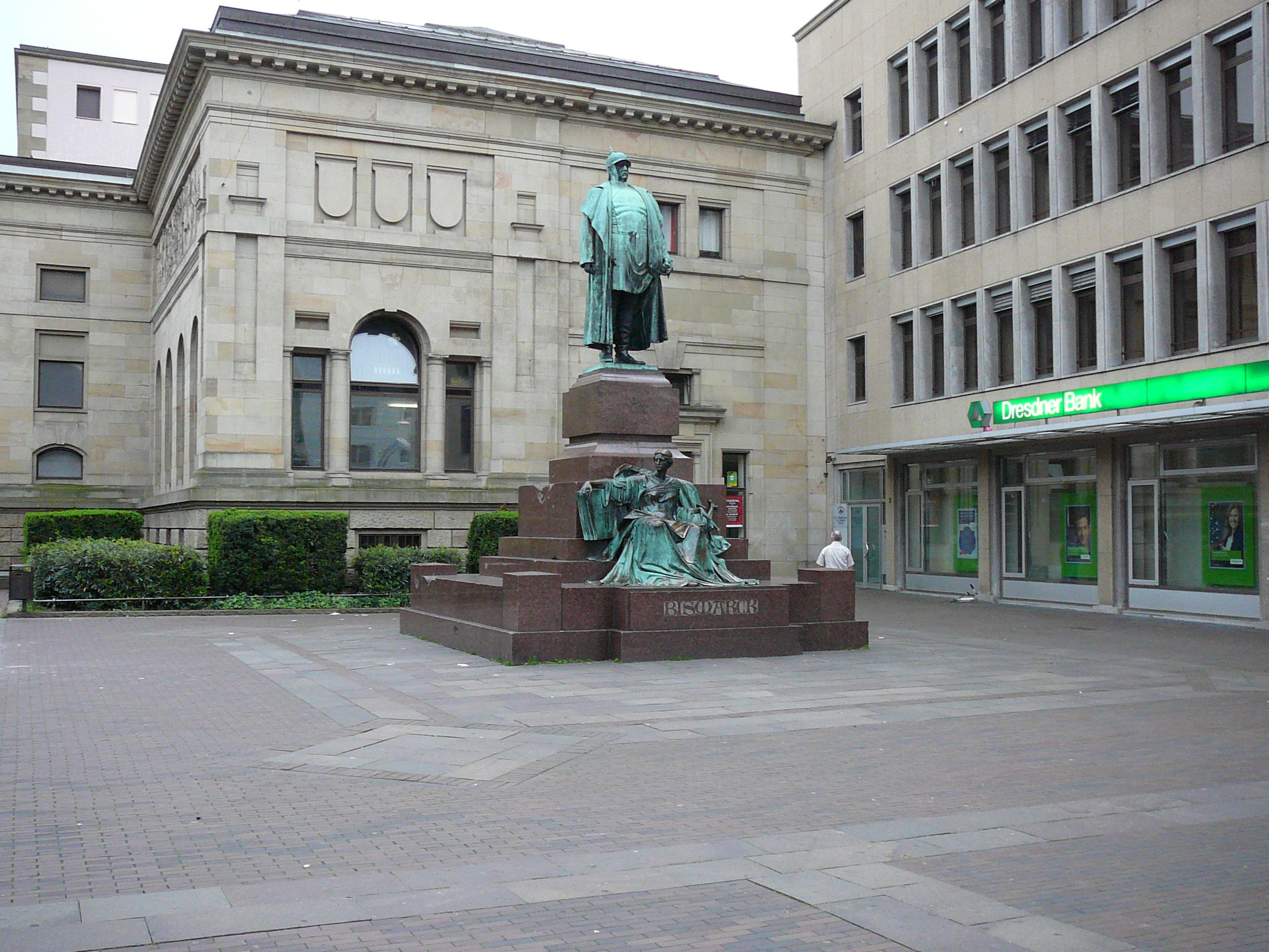 Geschwister-Scholl-Platz, Wuppertal Otto von Bismarck statue by Hugo Lederer